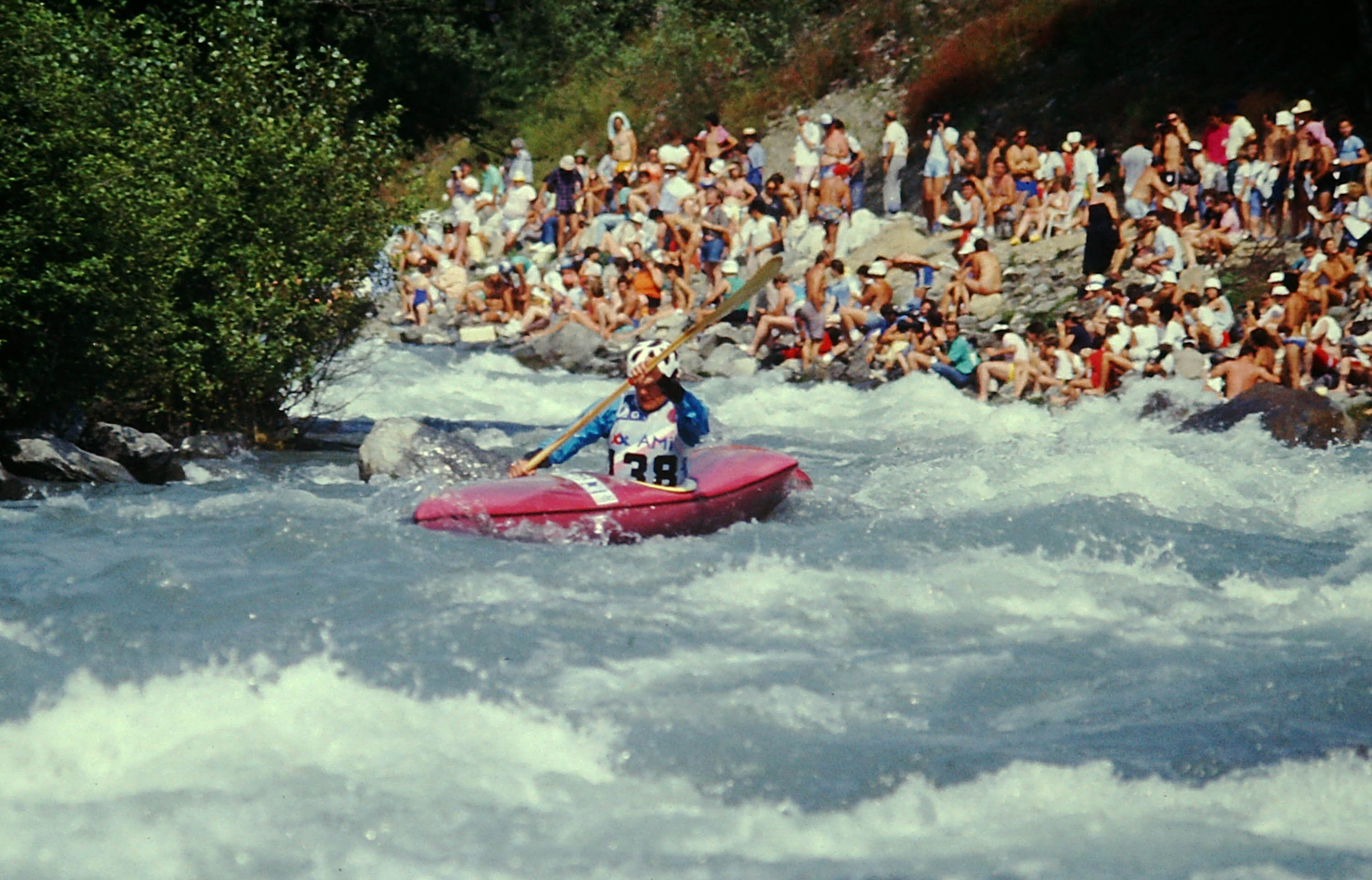 Dominique Gardette aux championnat du monde 1987